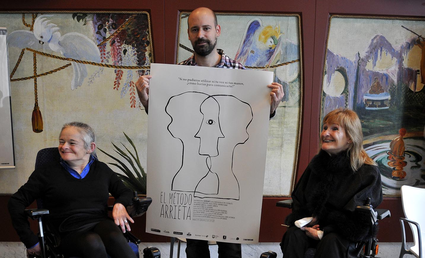 Prentsaurrekoa Lourdes eta Mentxu Arrietarekin, eta Jorge Gil Munárriz zuzendariarekin Rueda de prensa con Lourdes y Mentxu Arrieta, y el director Jorge Gil Munárriz Argazkia / Fotografía: Iñigo Royo